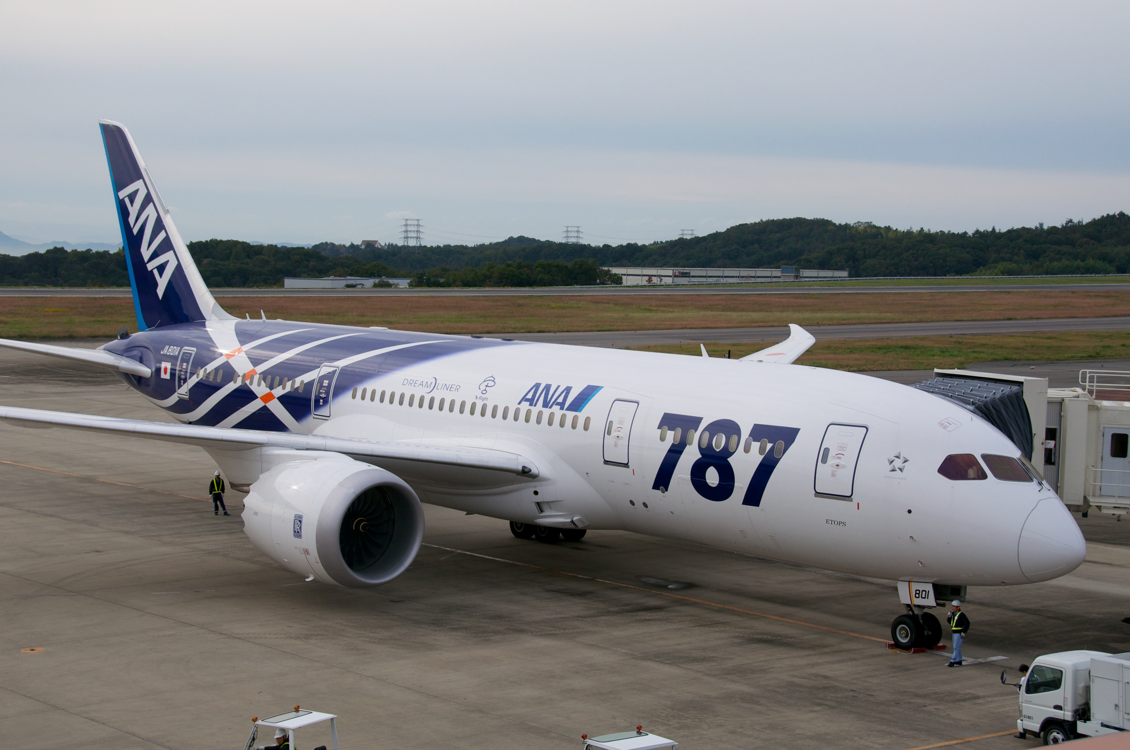 Okayama Airport